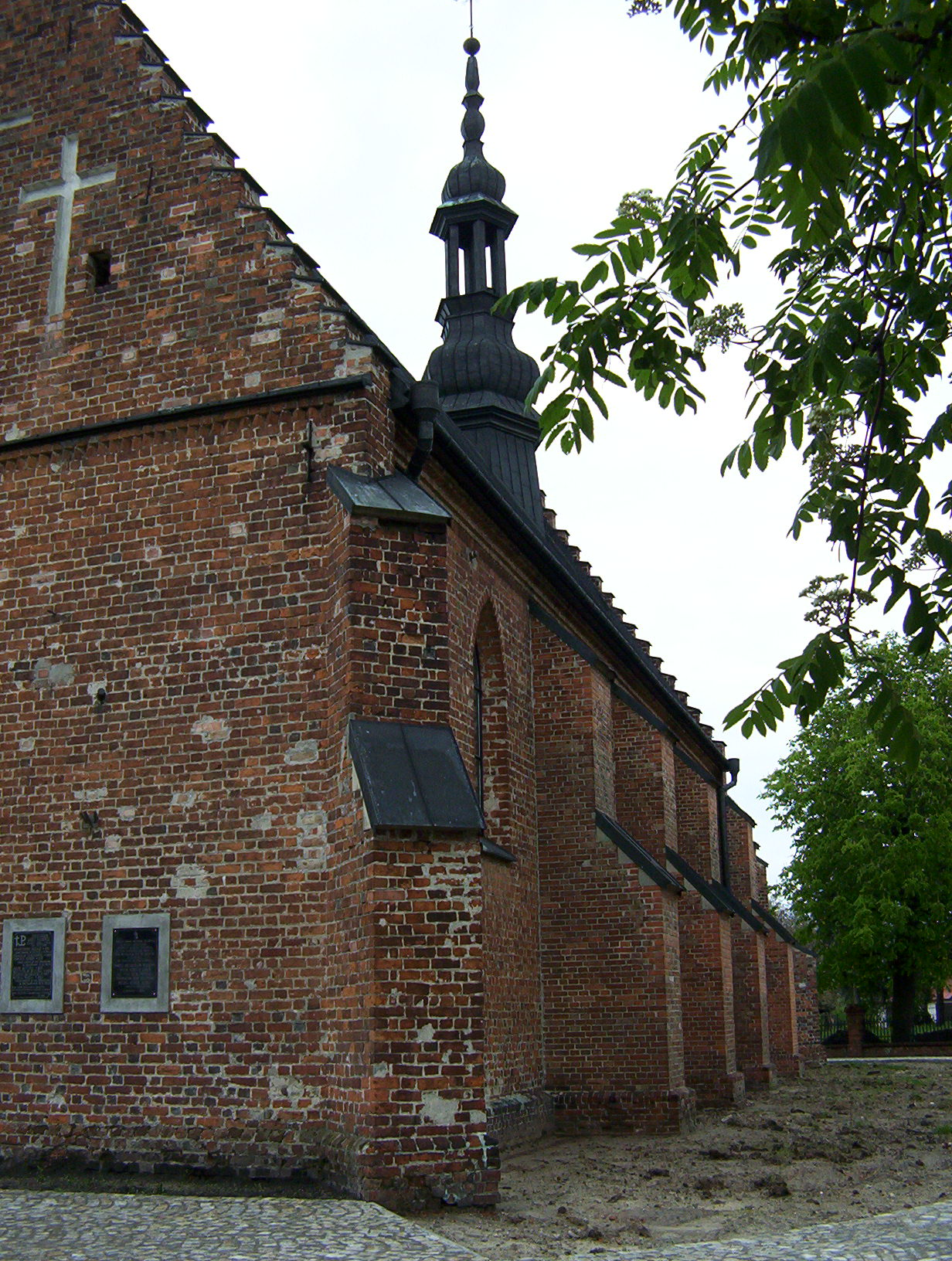 Miechociński kościół.